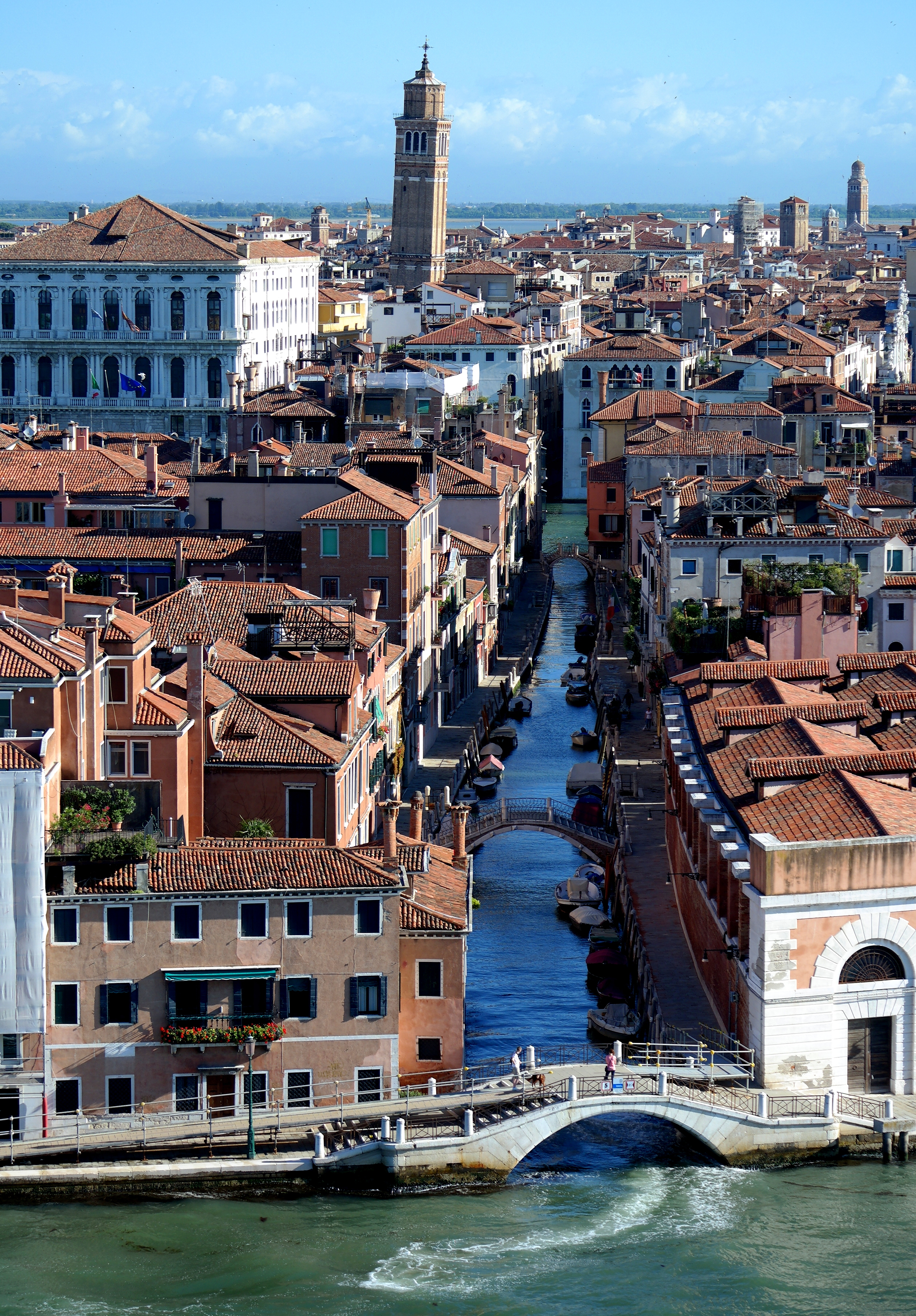 Rio de la Fornace, nel sestiere di Dorsoduro a Venezia. Sullo sfondo si intravede il campanile della Chiesa di Santo Stefano